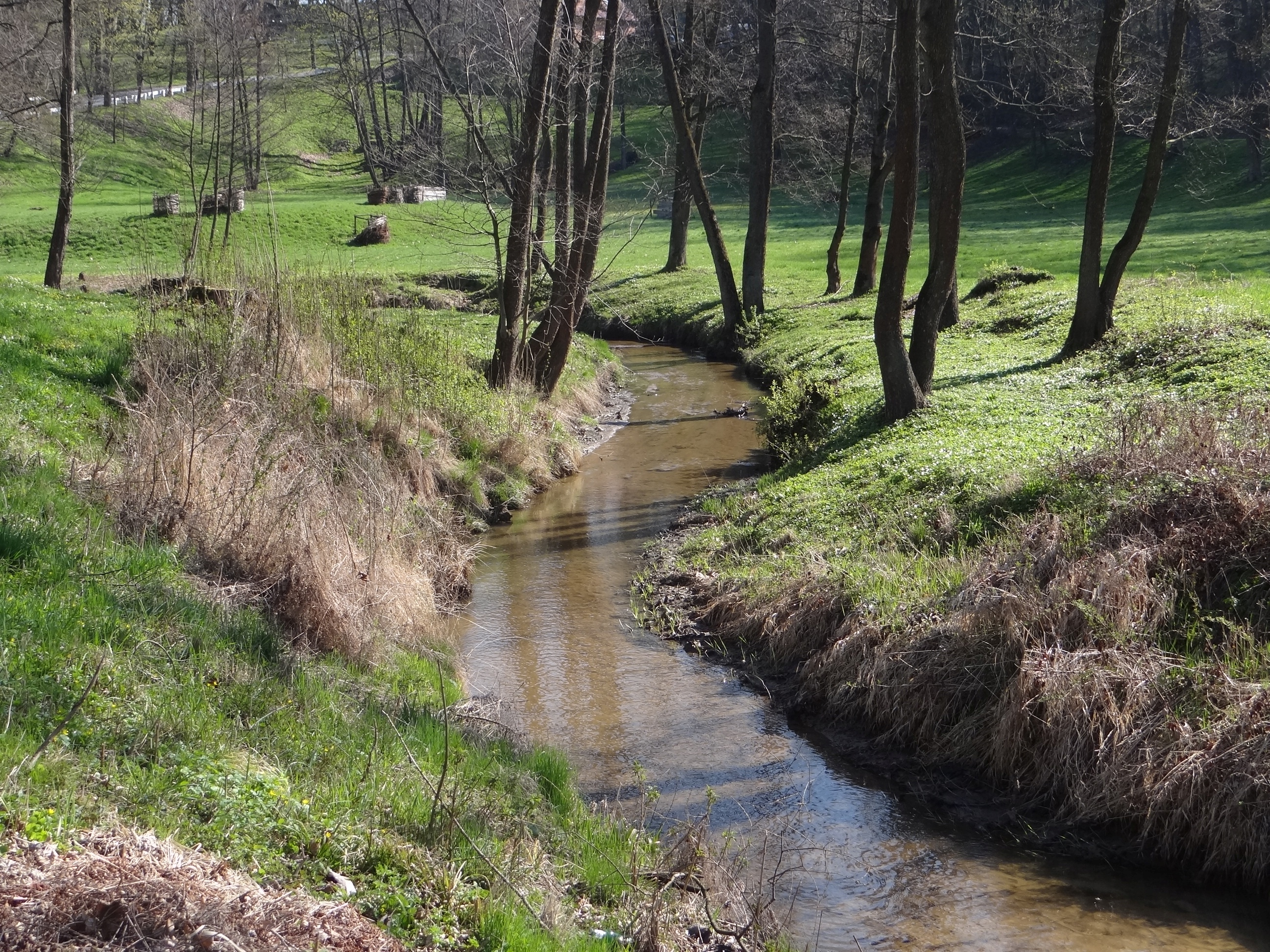 Leksandrówka w Nowym Wiśniczu